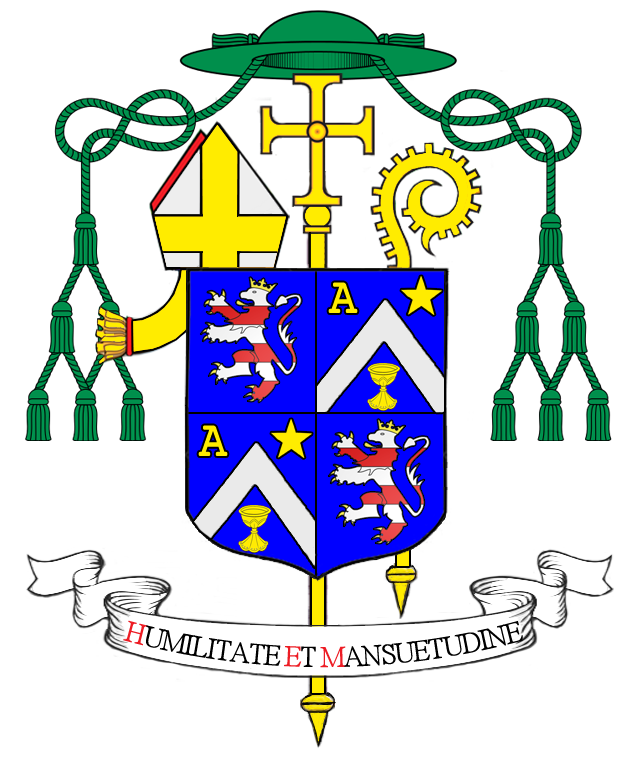 Wapenschild van Leo De Kesel